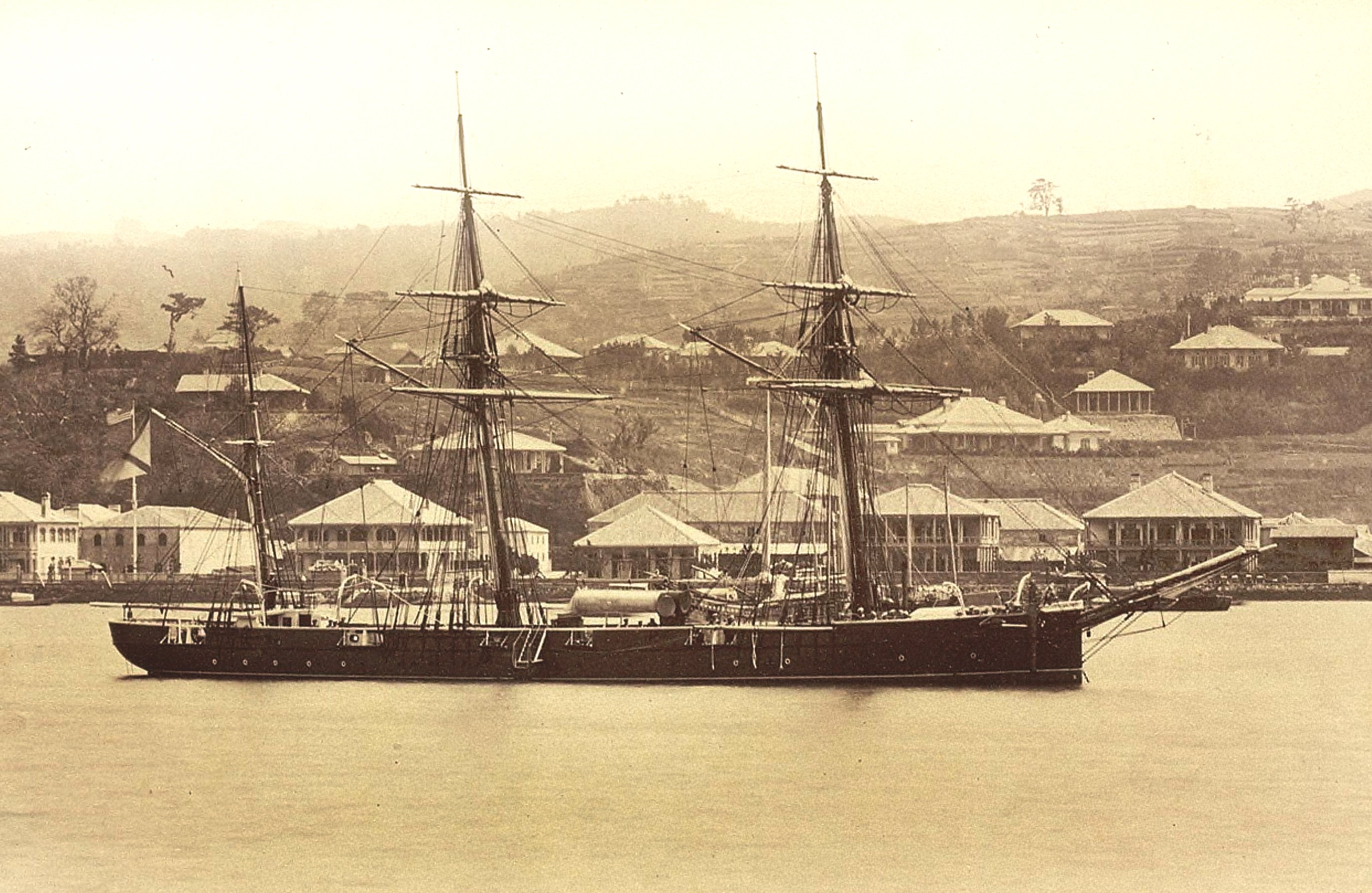 Канонерская лодка "Горностай" в Нагасаки. Снимок сделан после 1882 года.